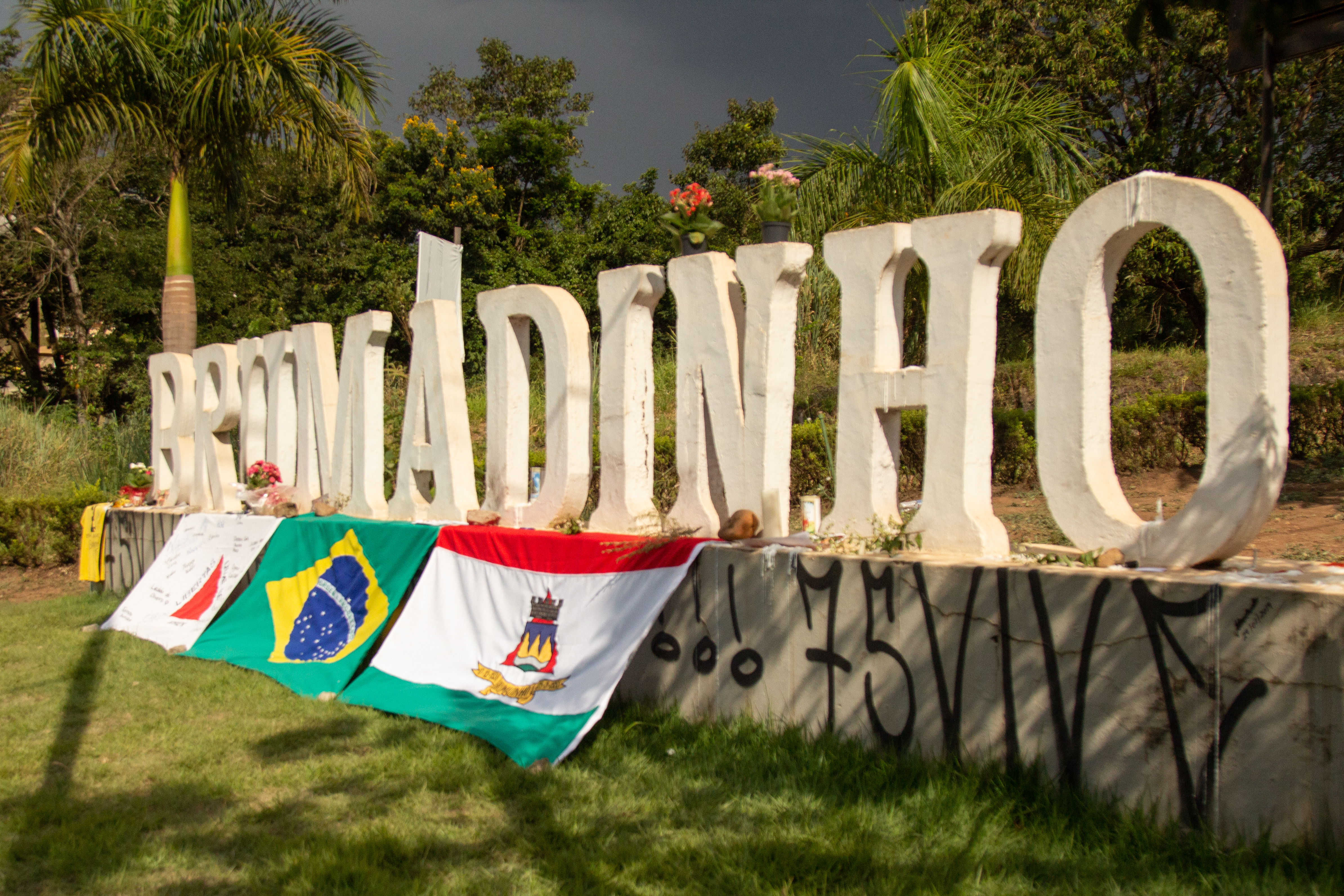 [2019-01-30] Brumadinho_104_Romerito Pontes